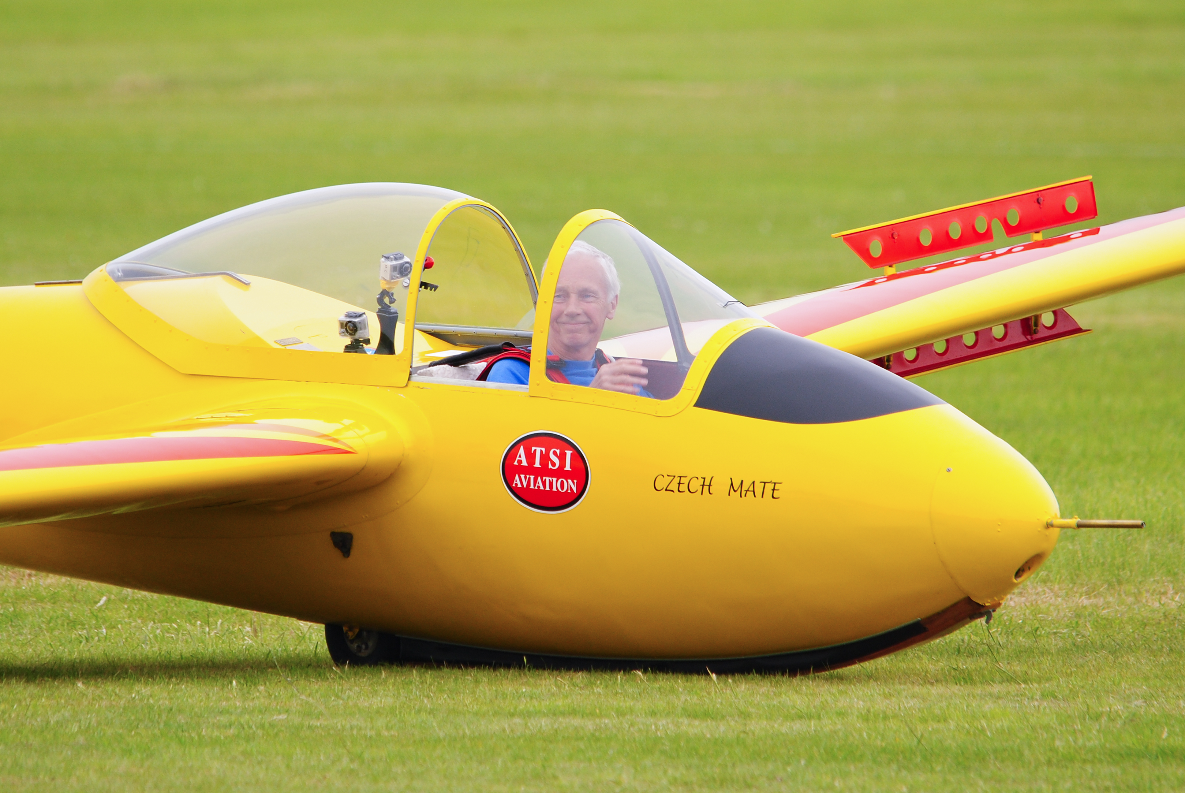 Letov LF-107 Lunak Glider